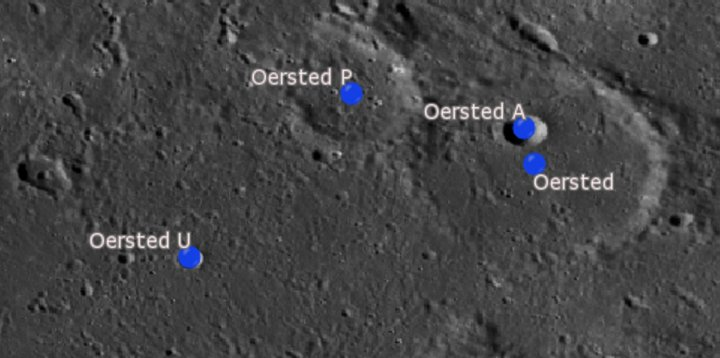 Cráter lunar Oersted. Cráteres satélite. (Imagen LRO)